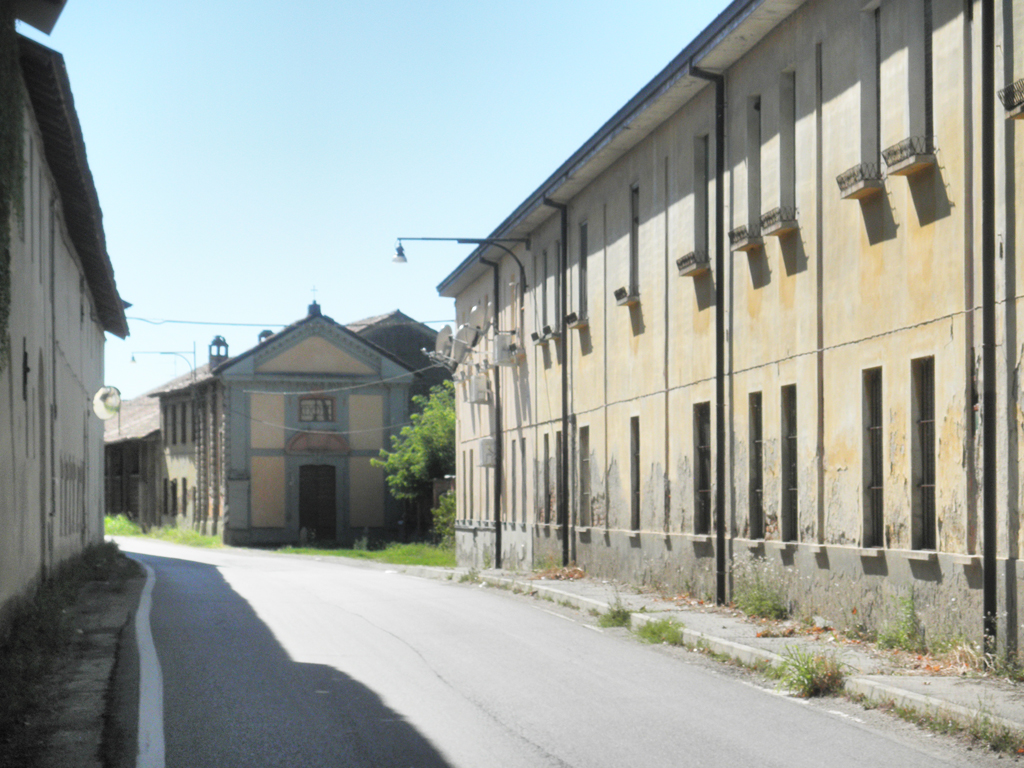 Vista di Monticelli Sillaro fraz. di Villanova del Sillaro, con l'oratorio di San Francesco